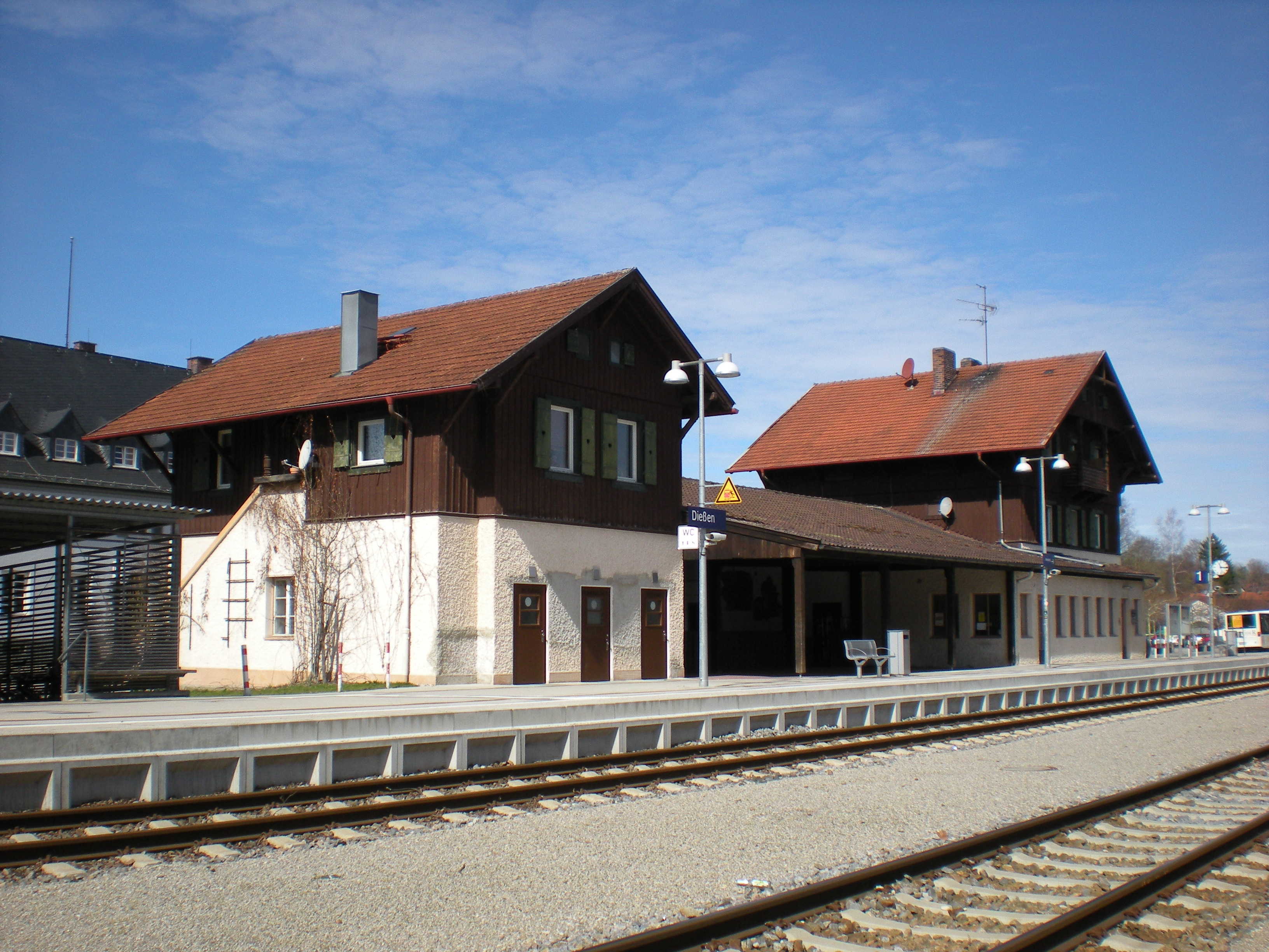 denkmalgeschütztes Empfangsgebäude des Bahnhofs Dießen von der Gleisseite